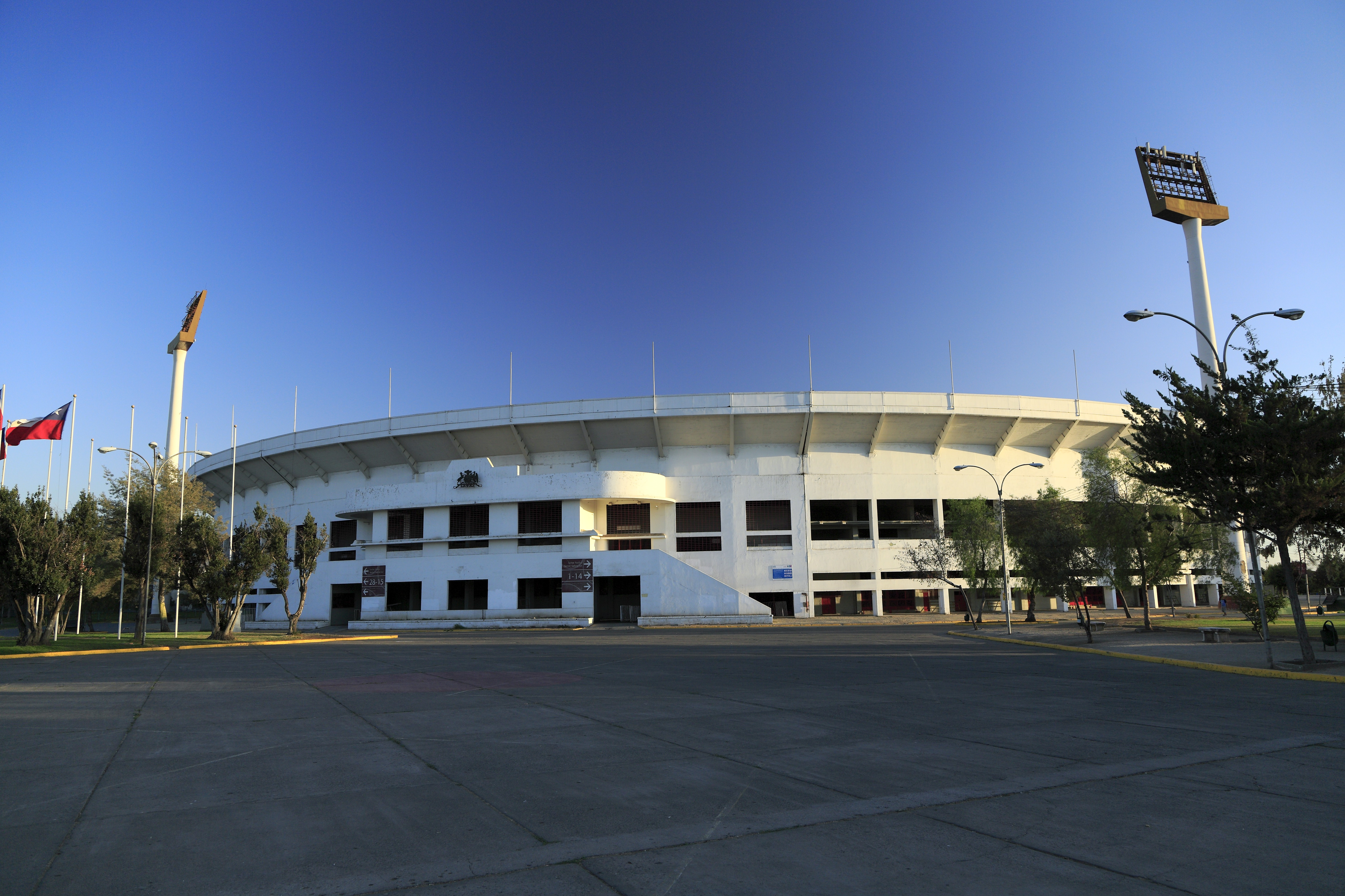 Nordseite von der Avenida Grecia, das Stadion wurde mitsamt dem gesamten Sportkomplex nach dem Militärputsch im September 1973 als Konzentrationslager genutzt.